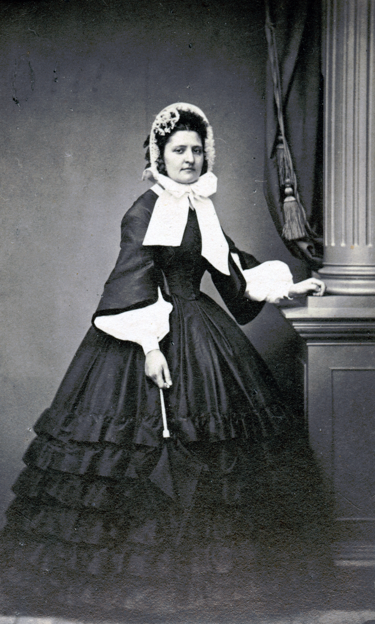 Gurli Lublin, sångare vid Kungliga Operan 1862